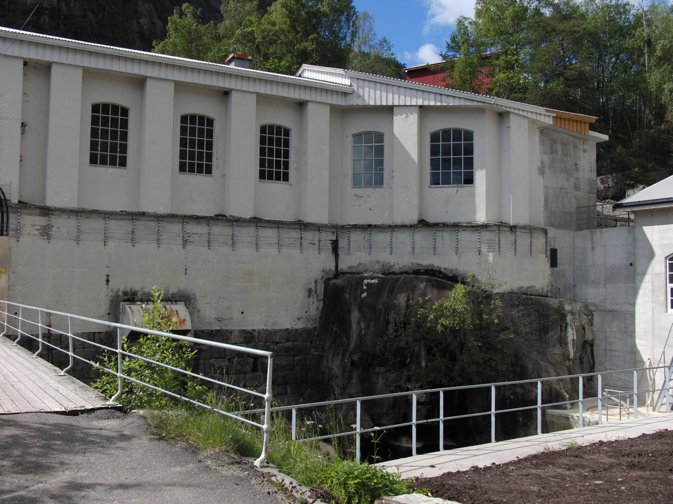 Trælandsfoss kraftverk